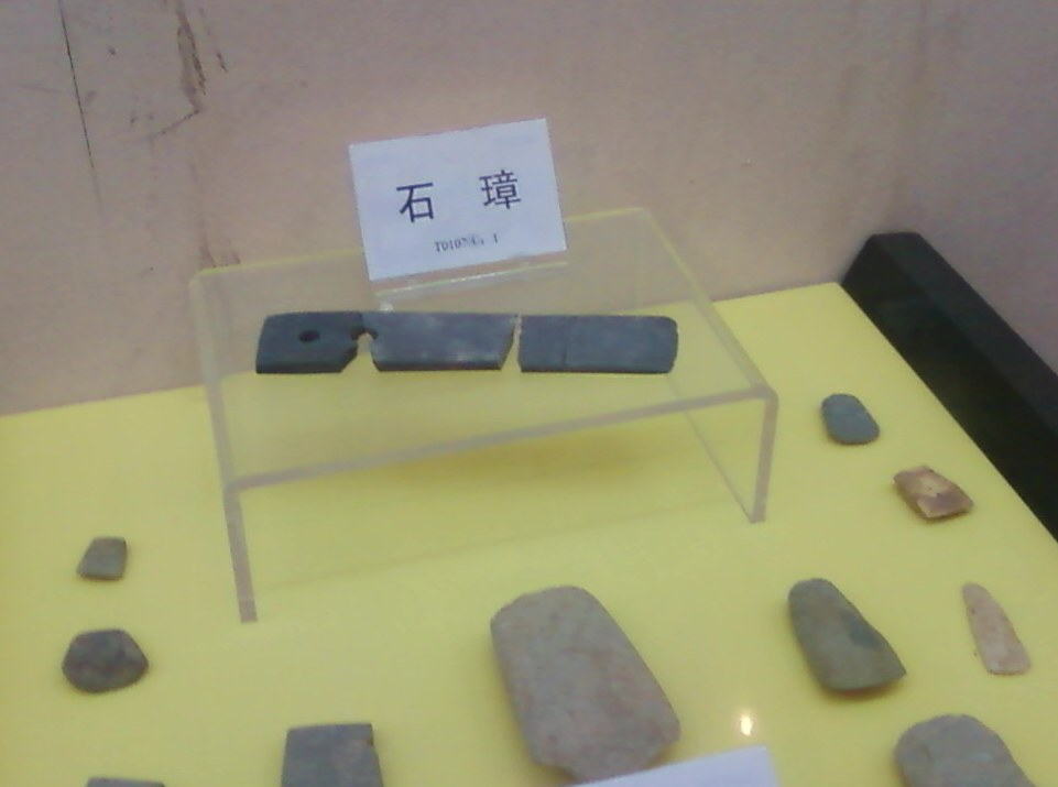 中國廣東新會古井鎮象邊山遺址出土的代表權力象徵的禮器「璋」